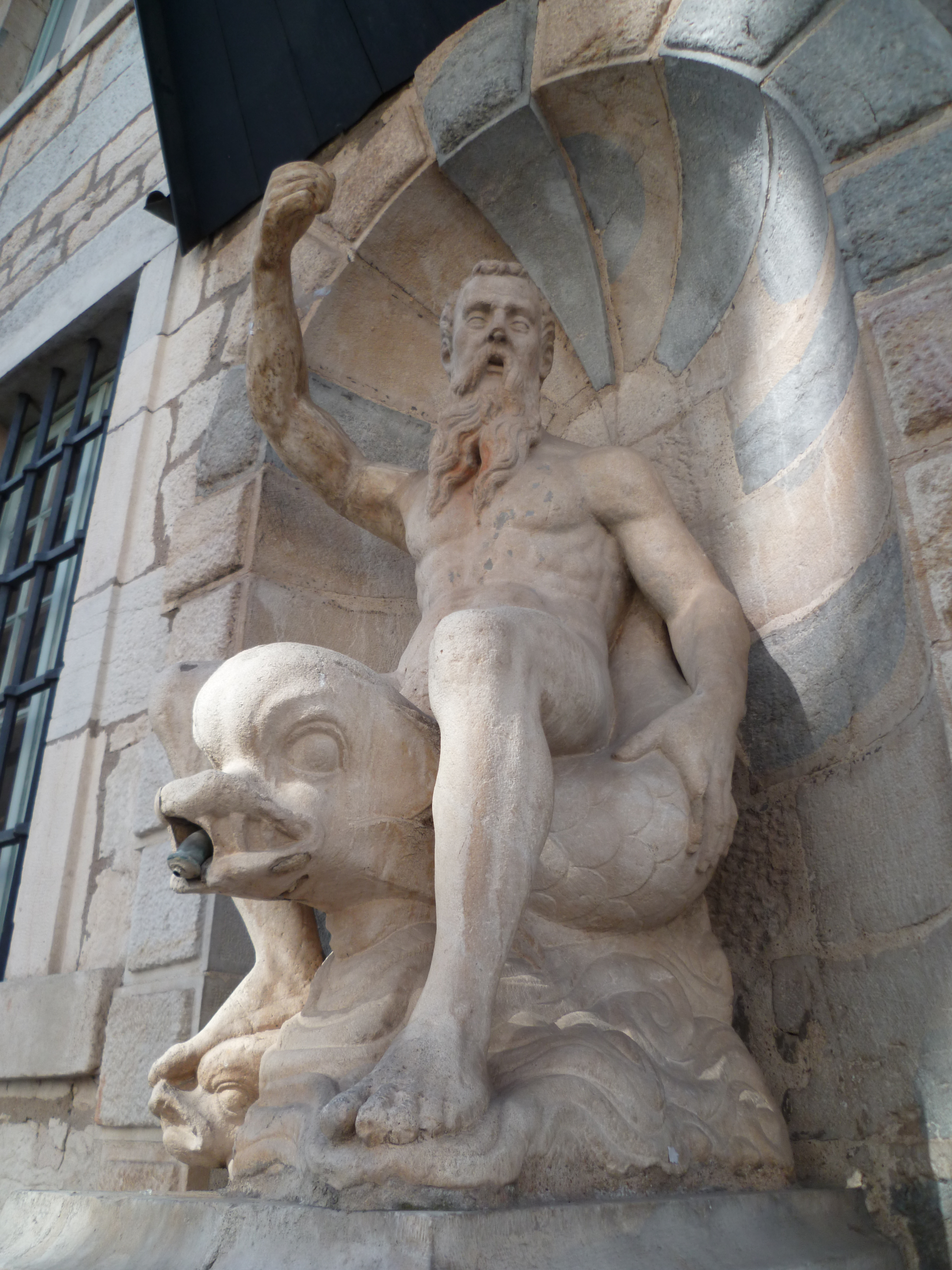 Fontaine des Carmes de Besançon, oeuvre de Claude Arnoux dit Lullier.